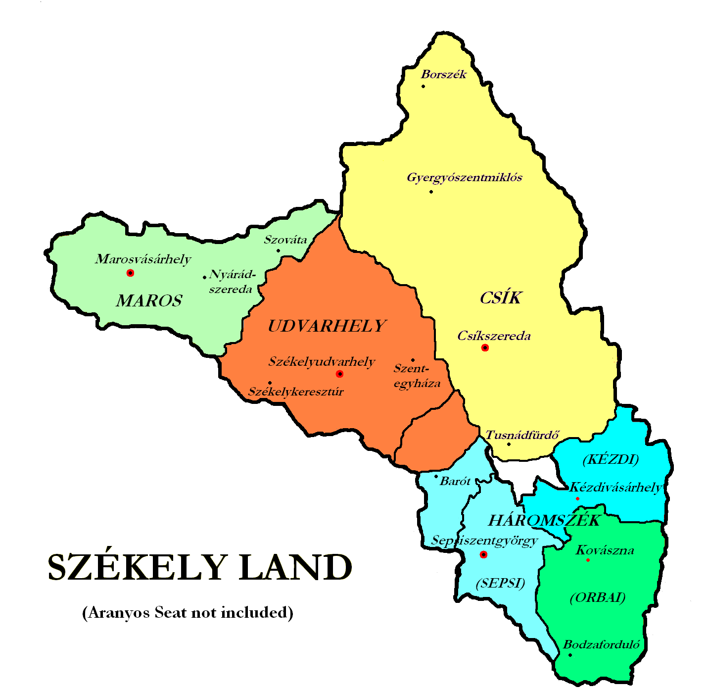 Map of Székely Seats